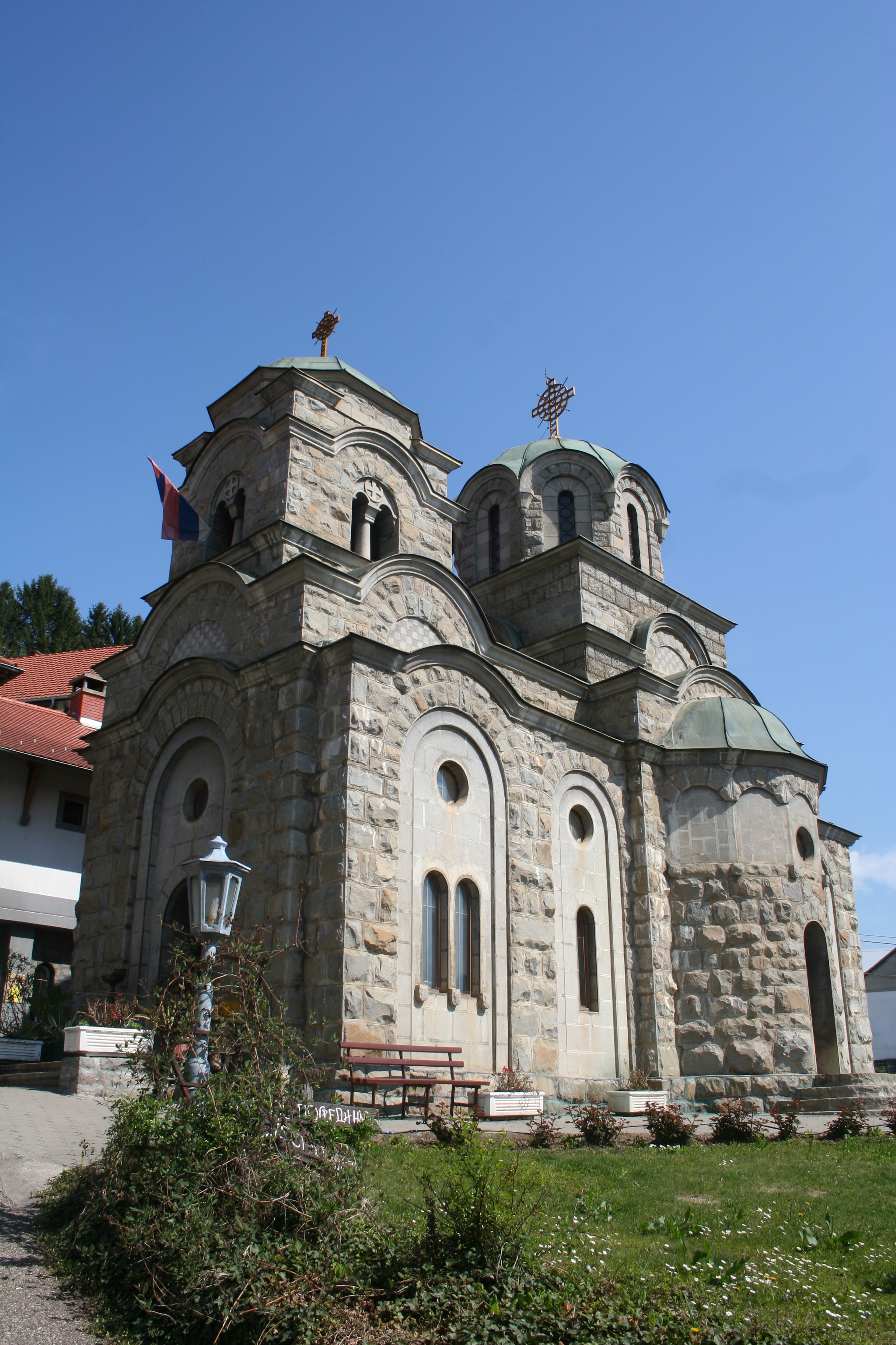 Crkva Preobraženja Gospodnjeg, Ljubovija